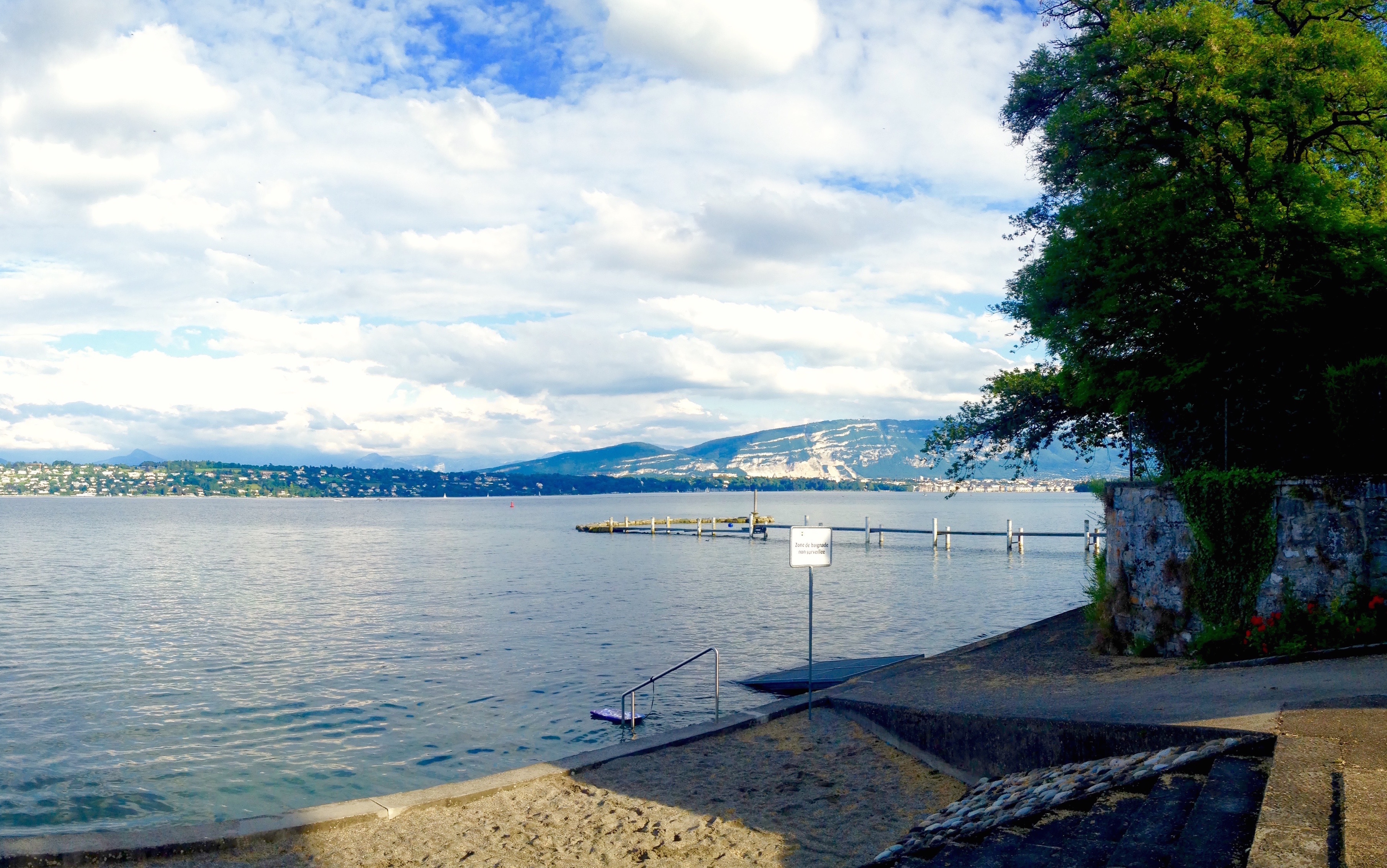 La plage communale de Pregny-Chambésy réservée aux habitants de la commune.